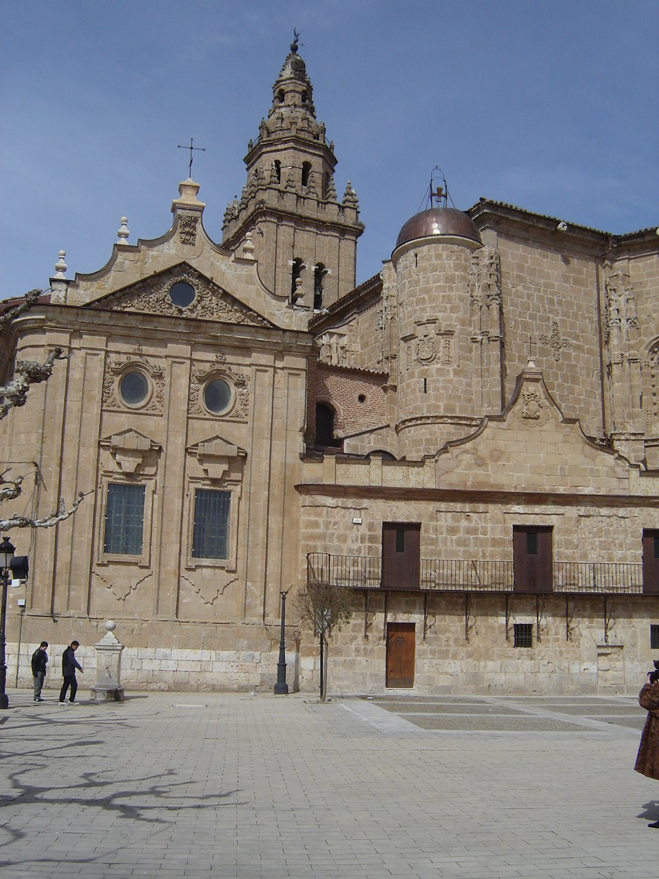 Igesia de Los Santos Juanes, de Nava del Rey (Valladolid)